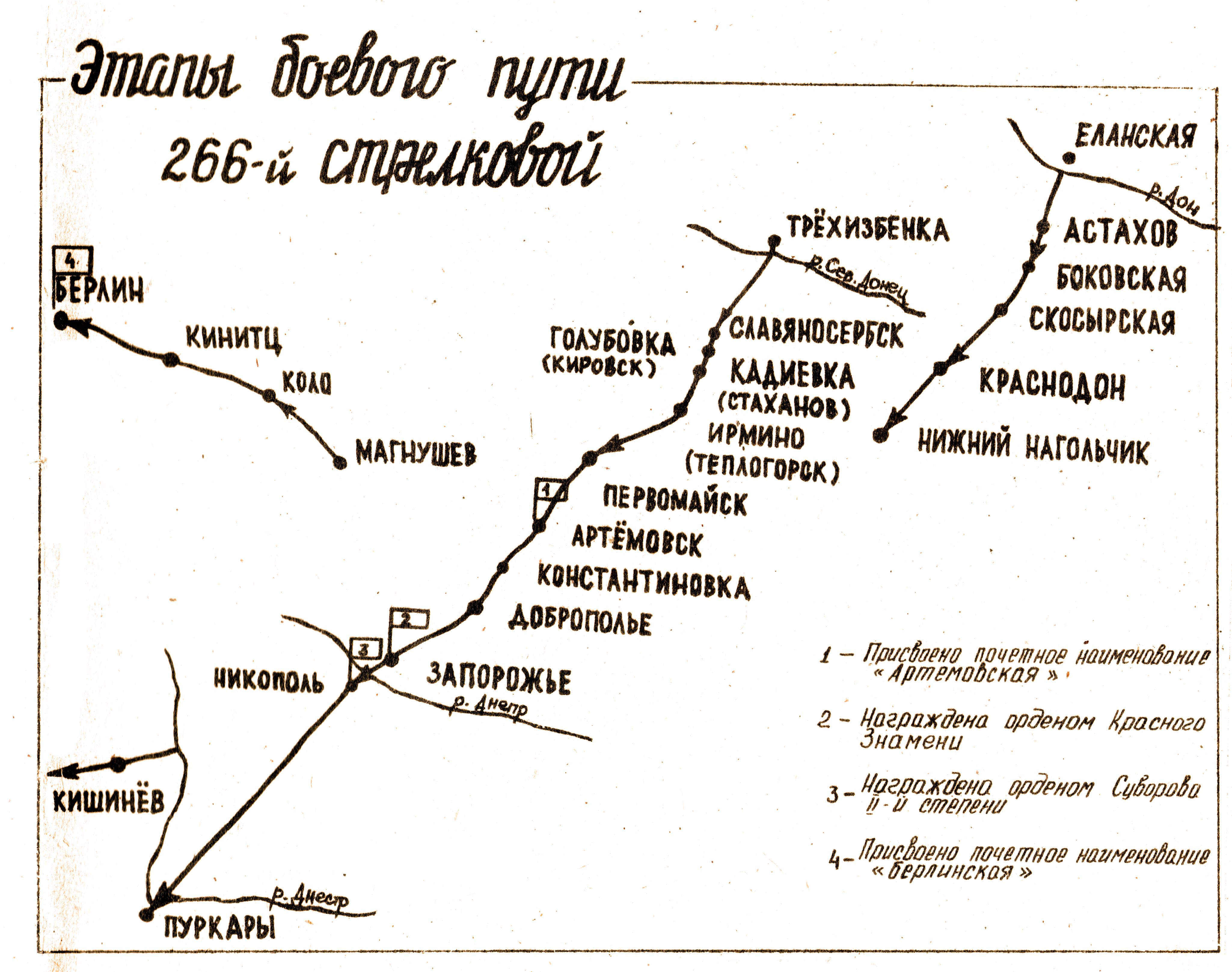 Этапы боевого пути 266- стрелковой дивизии